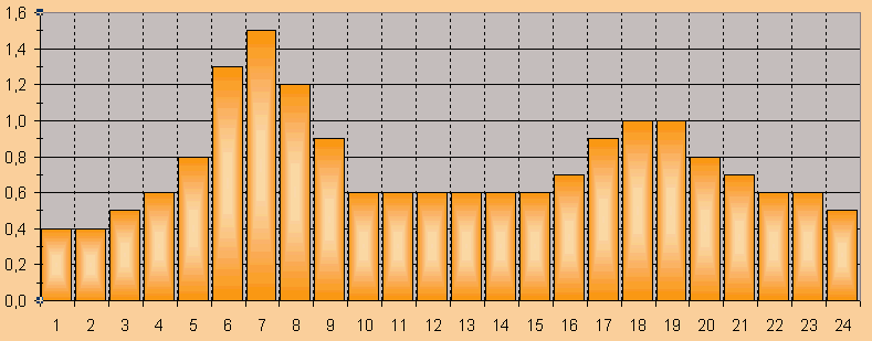 Diagramm der in eine Insulinpumpe programmierten Basalraten. Das Bild zeigt ein Basalratenprofil mit 18 IE pro Tag, aufgeteilt nach dem populären "Rechenschieber" nach Dr. Renner. Diagramm aus einer von mir selbst erstellten MS Excel-Datei.